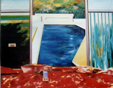 Les yeux d'aurore, peinture de Ksenia Milicevic (80*60 cm).